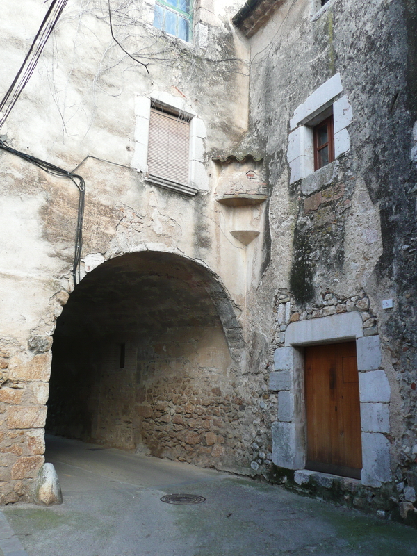 Volta al carrer Lladó de Vilanant (Alt Empordà)